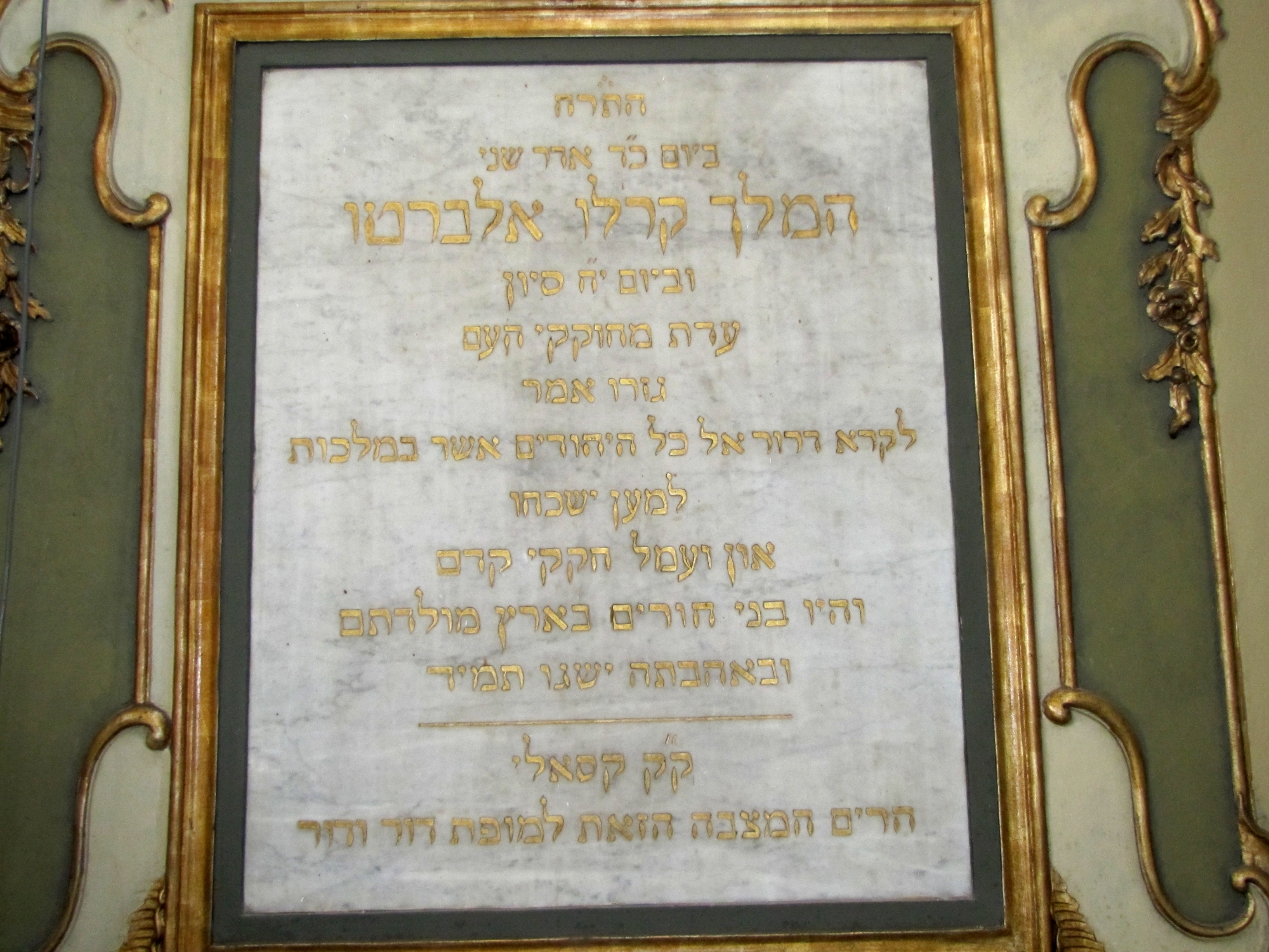 Casale Monferrato Synagogue